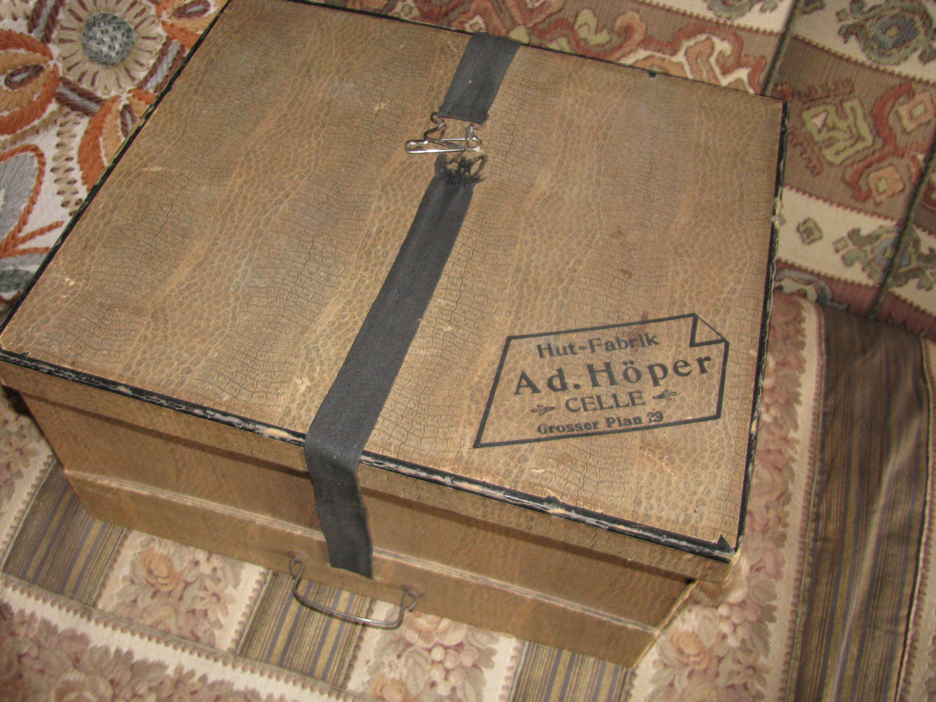 Hutschachtel für einen Zylinder der Firma Adolf Höper, Celle, Großer Plan 29. Der Zylinder gehörte dem Musiker Theodor Krüger, Celle, was aus den goldenen Initialen im Innenfutter hervorgeht. Die Großtochter Ilse Paul trägt ihn bei besonderen Veranstaltungen als Markenzeichen.